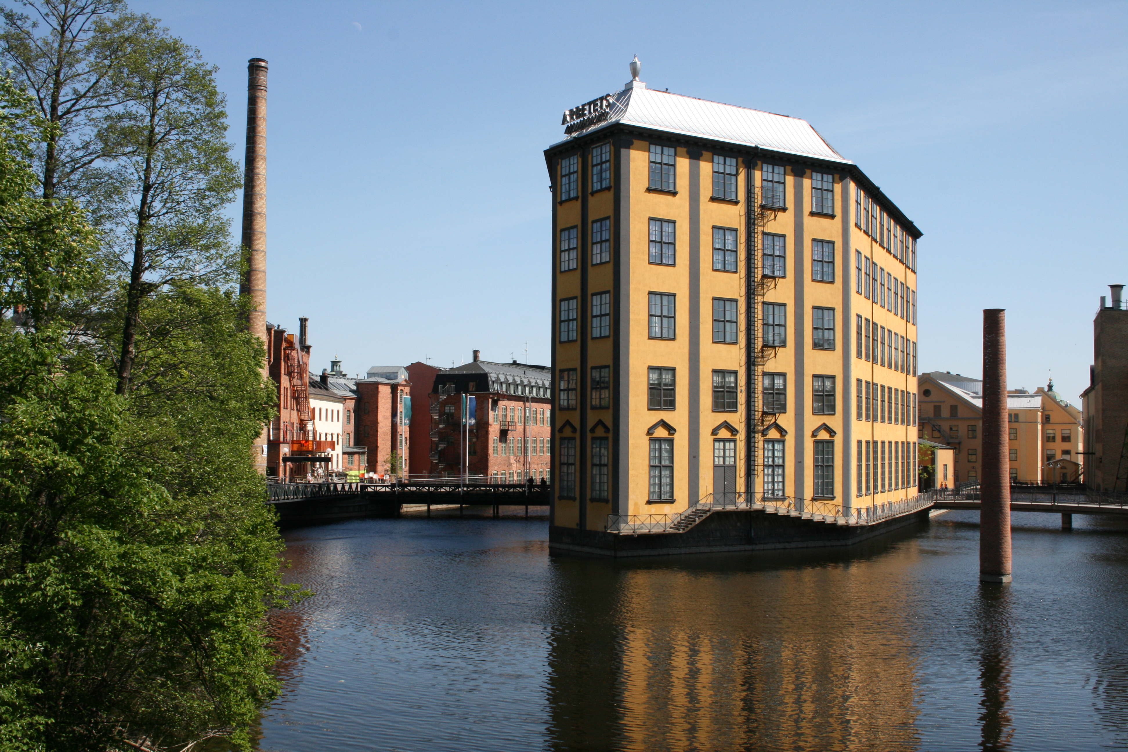 Strykjärnet i Norrköping, till höger konstverket The Fifth Chimney